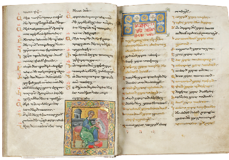 ვარძიის ოთხთავი